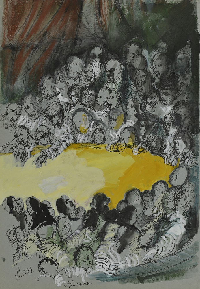 «Балаган» из серии «Лезвие». Бумага, акварель, белила